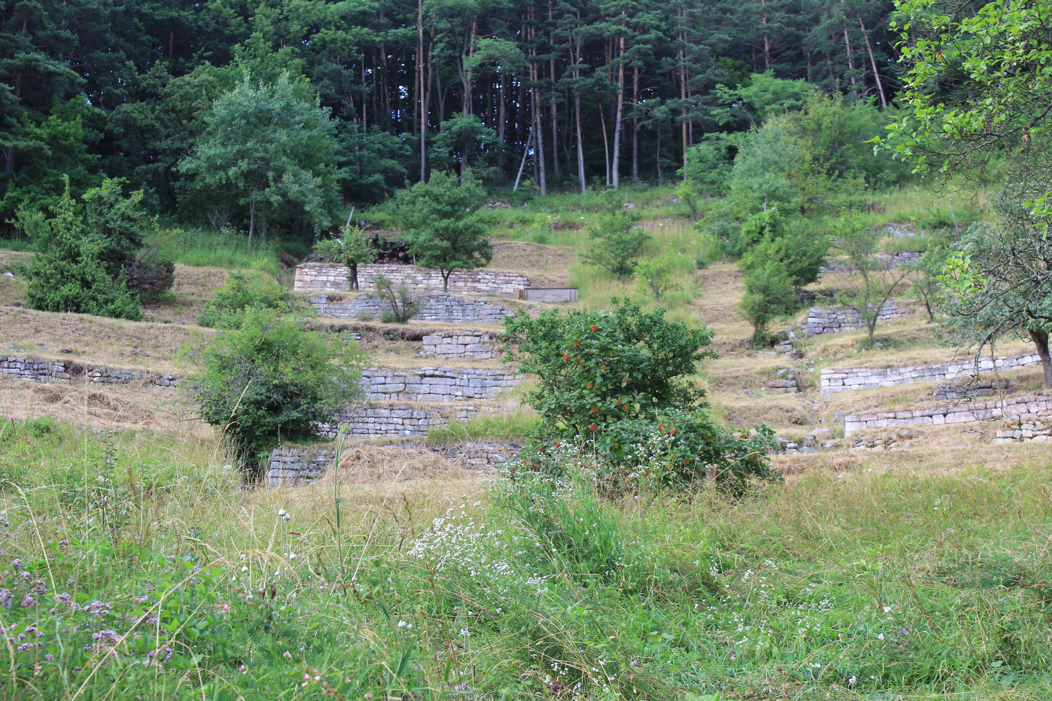 Manche der jahrhunderte lang bewirtschafteten Weinberg-Terassen wurden zwischen dem 30jährigen Krieg und dem 19. Jahrhundert aufgegeben. Diese Steinterassen künden aber noch heute davon, dass der Spitzberg bis ins 16. Jahrhundert als bedeutende Weinbauregion galt.